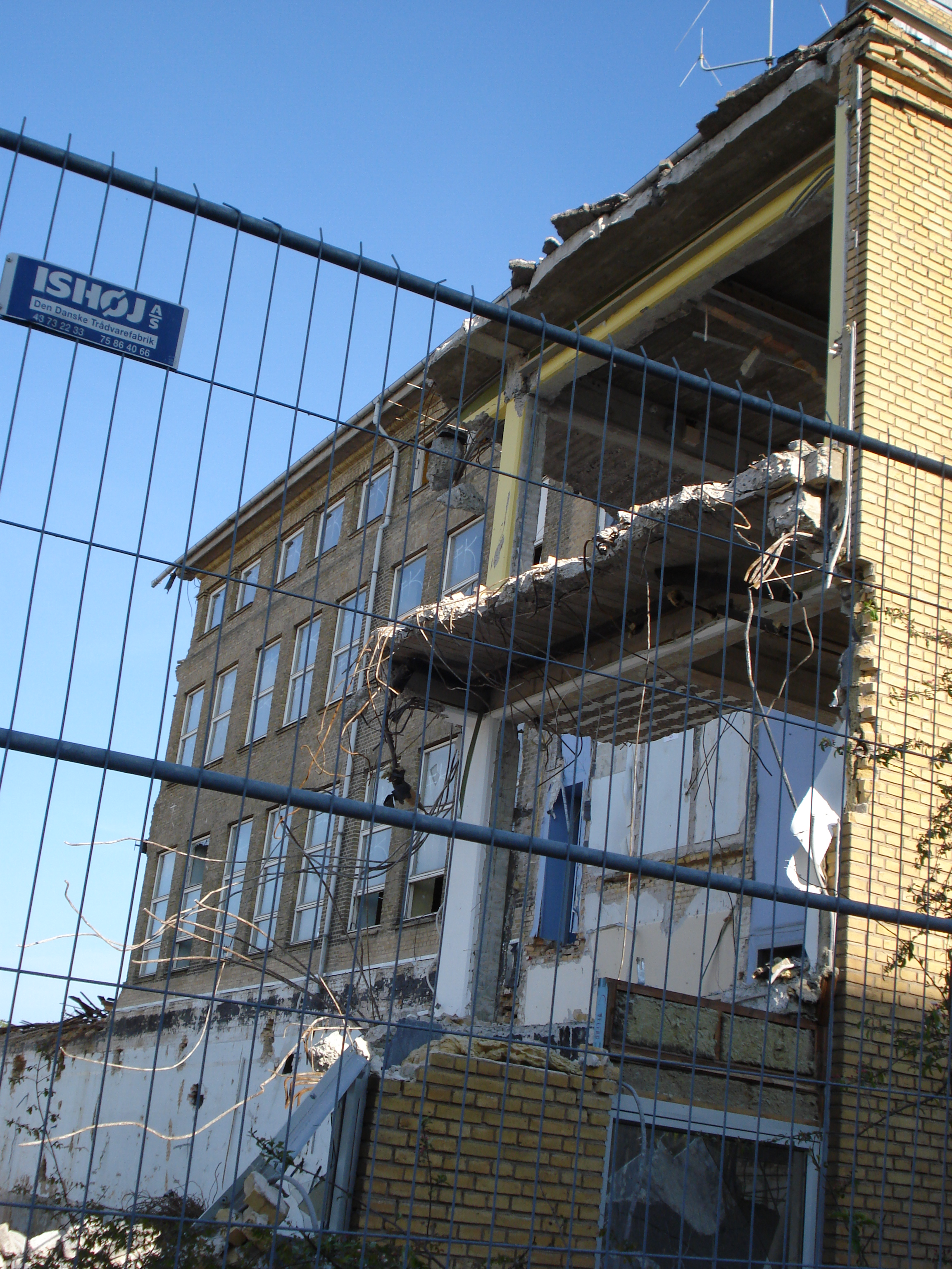 Lyngby Tekniske Skole.